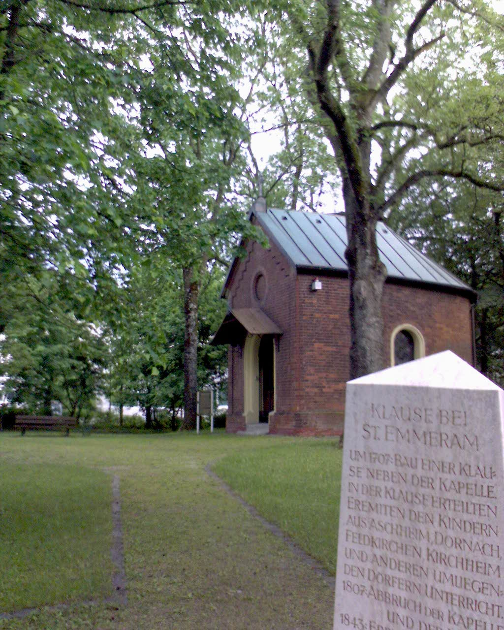 An dem von Bischof Arbeo von Freising bezeugten Sterbeort des Hl. Emmeran ist seit 1842 eine Kapelle erbaut. Foto: Lars Mc Murray Datum: Jun, 06